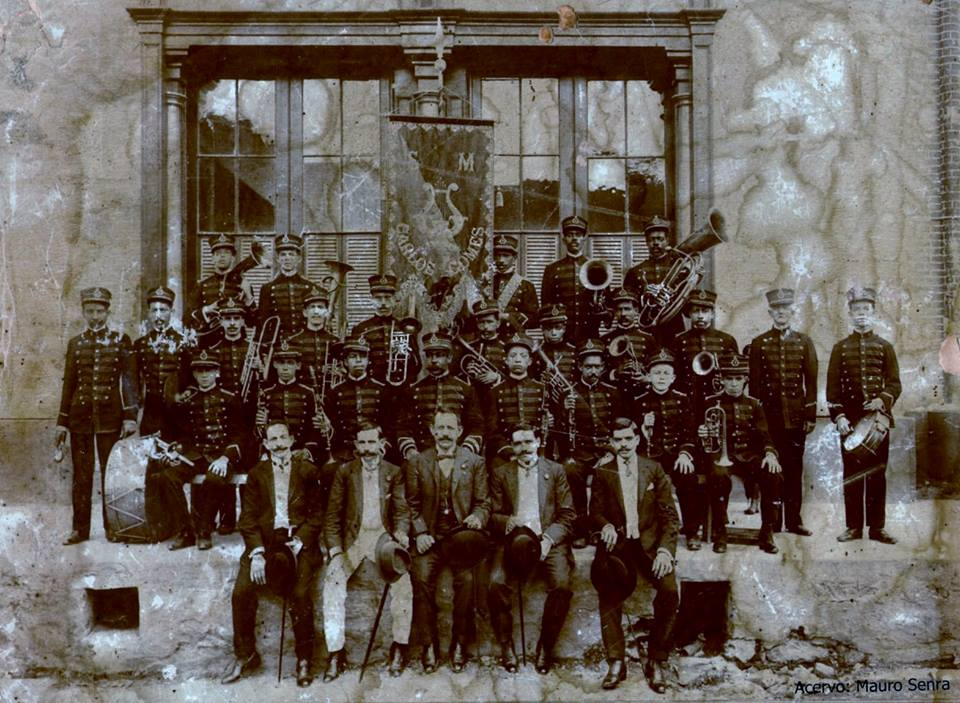 Foto de Alberto Landoes, em 1907. Acervo Mauro Senra.